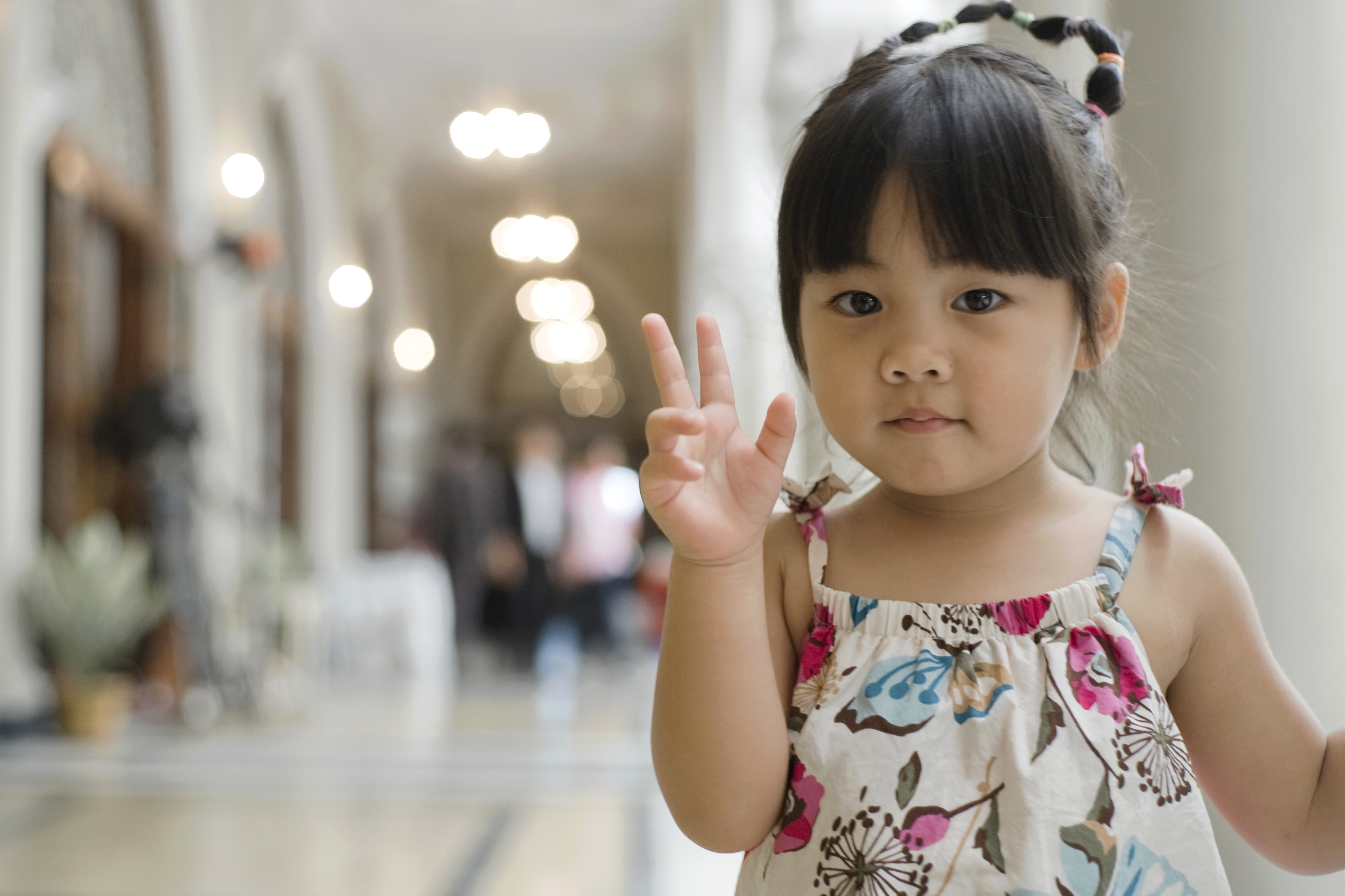 สู้ๆ นะค่ะนายกฯ สู้ๆ นะค่ะพี่ๆ อาสาสมัคร กลุ่มอาสาสมัครในโครงการ 6 วัน 63 ล้านความคิด ร่วมเดินหน้า ปฏิรูปประเทศไทย รวมรวบเหล่าความคิดเห็นจากประชาชนไทยที่ร่วมบริจาคผ่านทางโทรศัพท์หมายเลข 02-304-9999 ณ ห้องสีฟ้า ตึกสันติไมตรี ทำเนียบรัฐบาล วันอาทิตย์ ที่ 4 กรกฏาคม พ.ศ 2553 (Photographer attached to the Prime Minister of the Kingdom of Thailand : Peerapat Wimolrungkarat / พีรพัฒน์ วิมลรังครัตน์)